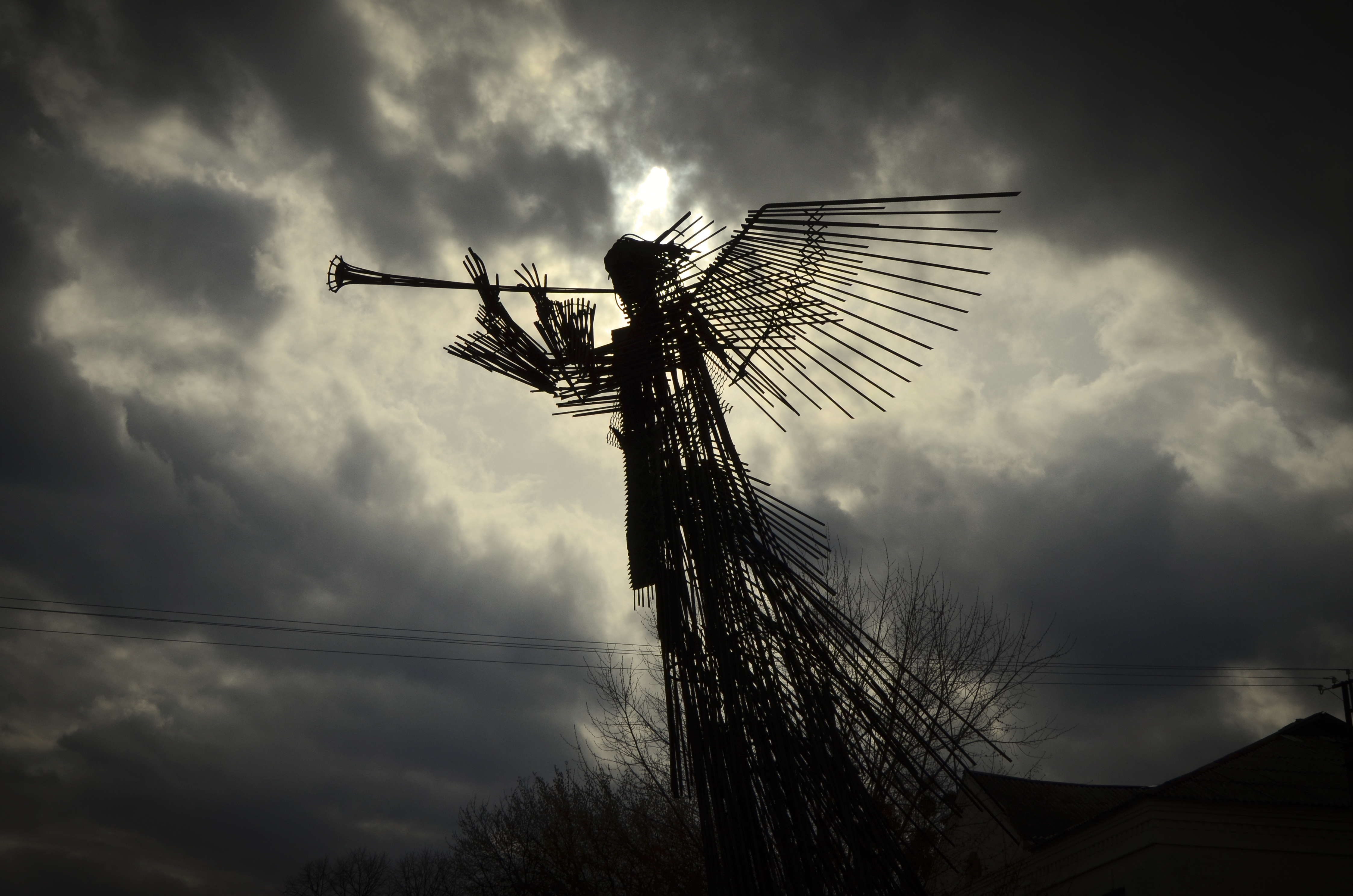 Меморіальний комплекс "Зірка Полин" на кладовищі ліквідаторів у м. Чорнобиль